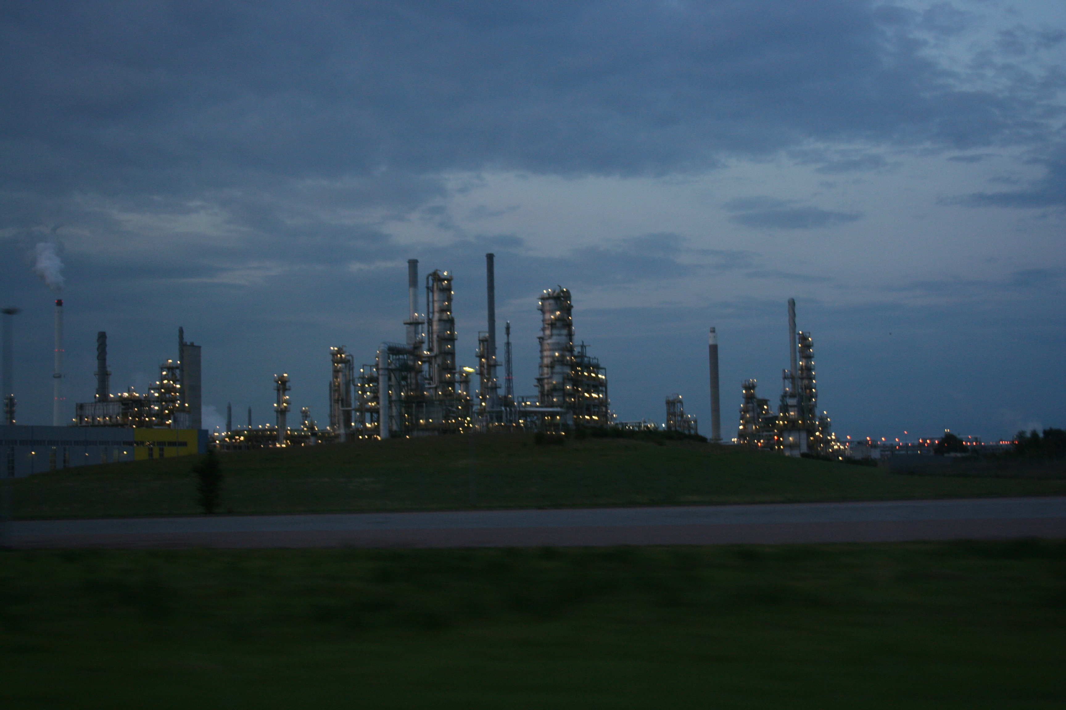 Leunawerke am Abend aufgenohmen aus einem Auto